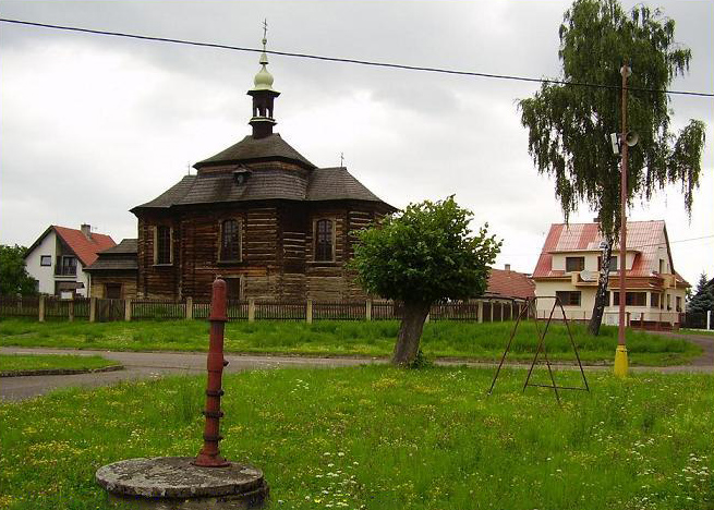 Pumpa a kostel sv. Jiří v Loučné Hoře